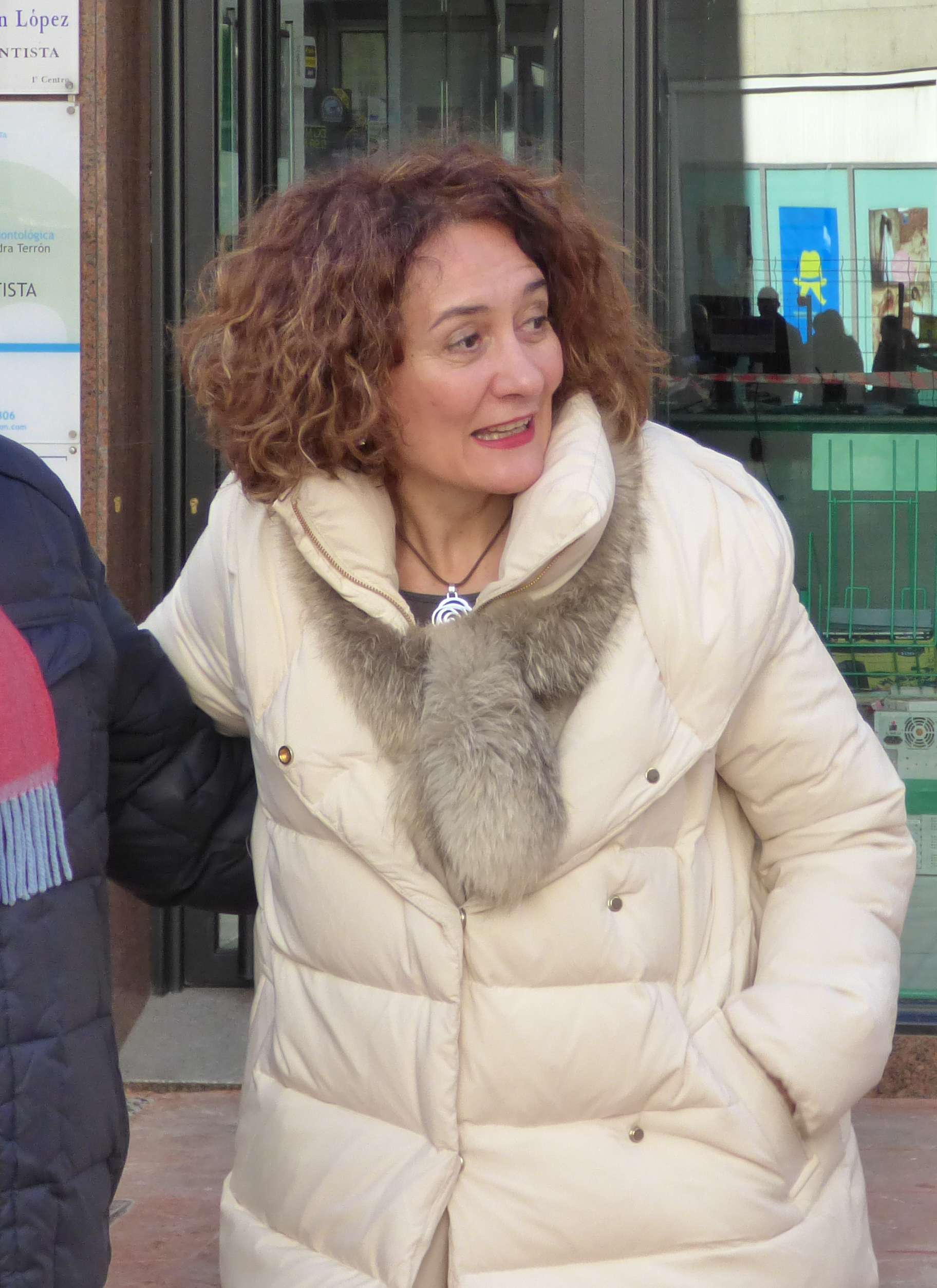 La entonces alcaldesa de Ponferrada, Gloria Fernández Merayo, en la inauguración de una plaza junto a un vecino de la capital berciana